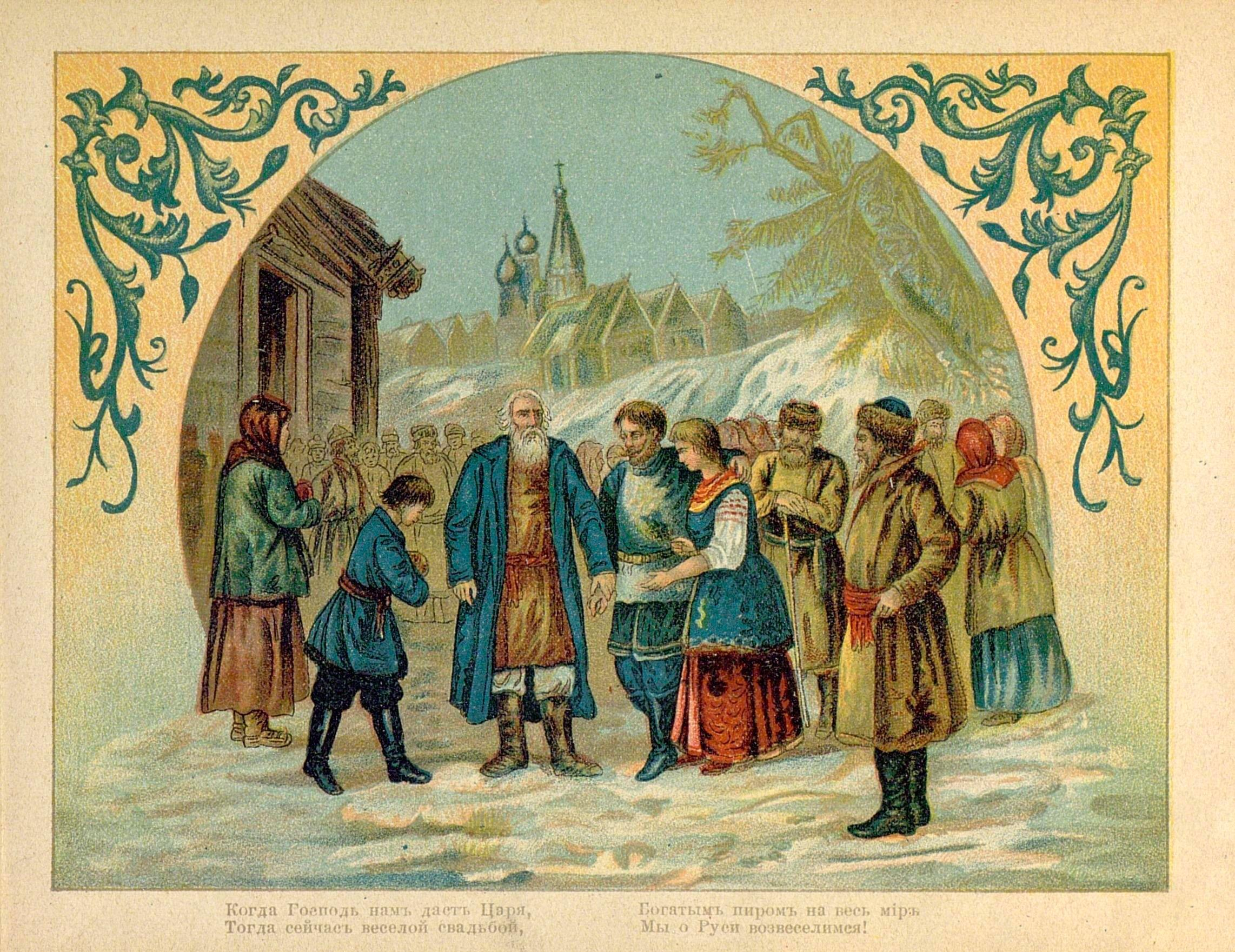 Жизнь за царя: драма-опера в восьми картинах.